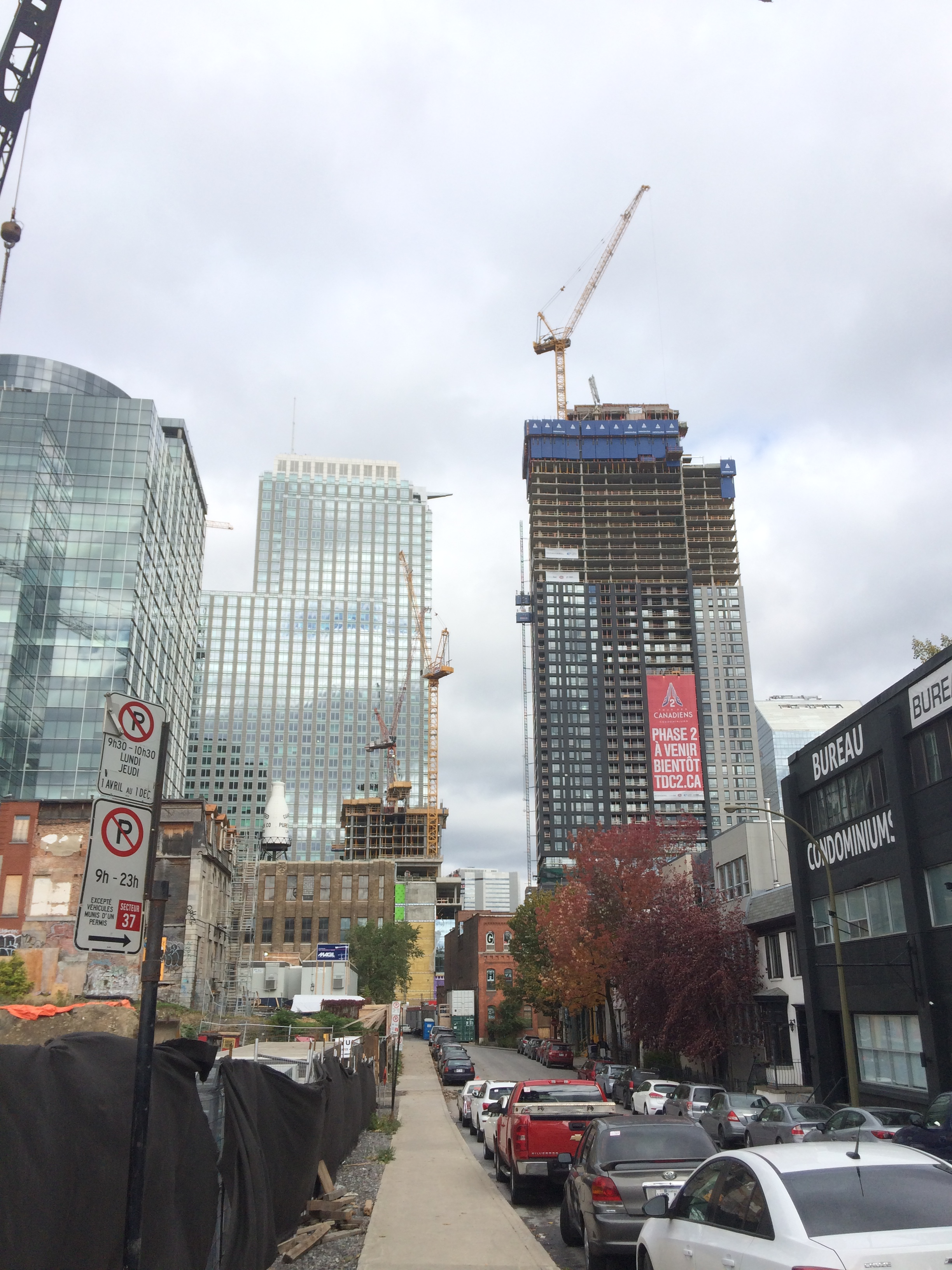 Overdale view